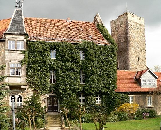 Burg Oebisfelde April 2005